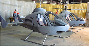 Сборочный участок ООО"Беркут"